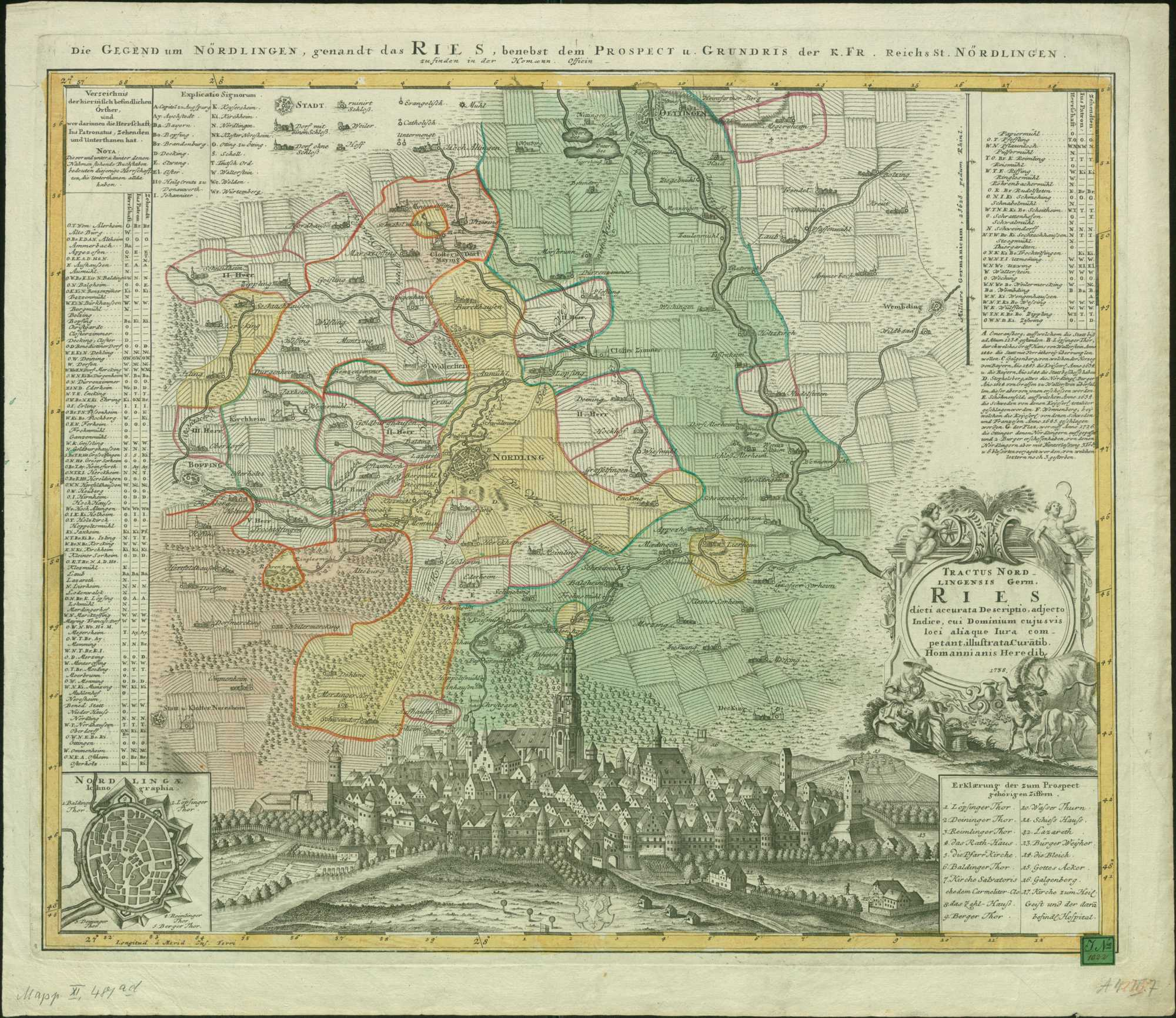 Karte von Nördlingen und dem Ries 1738 Tractus Nordlingensis Germ. Ries dicti accurata Descriptio, adjecto Indice, cui Dominium cujusvis loci aliaque Iura competant illustrata, [Nürnberg], 1738